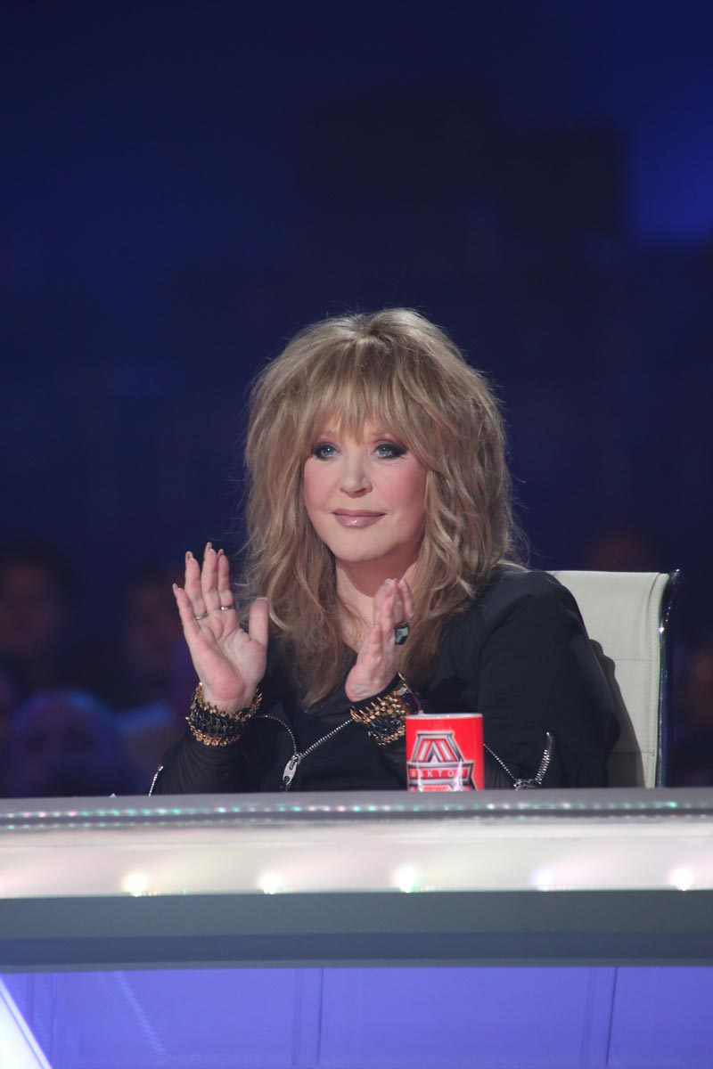 Алла Пугачёва - председатель жюри проекта "Фактор А"